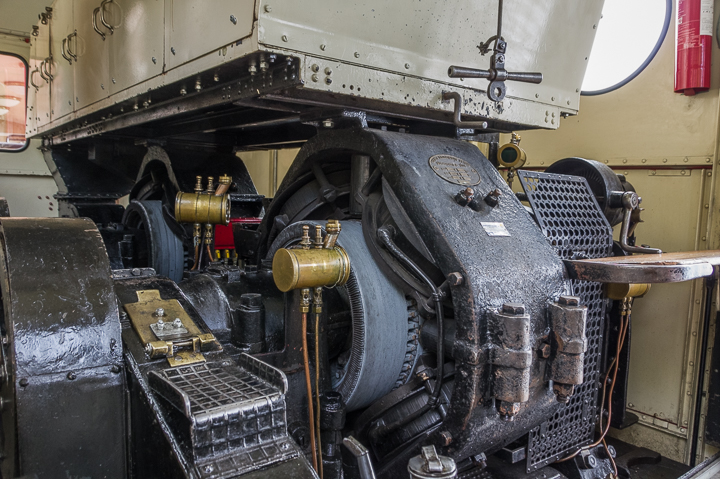 Der Lockführer sitzt auf dem Sitzbrett recht mit dem Lochblech dahinter als Lehne. Der Elektromotor ist mehr oder weniger offen.